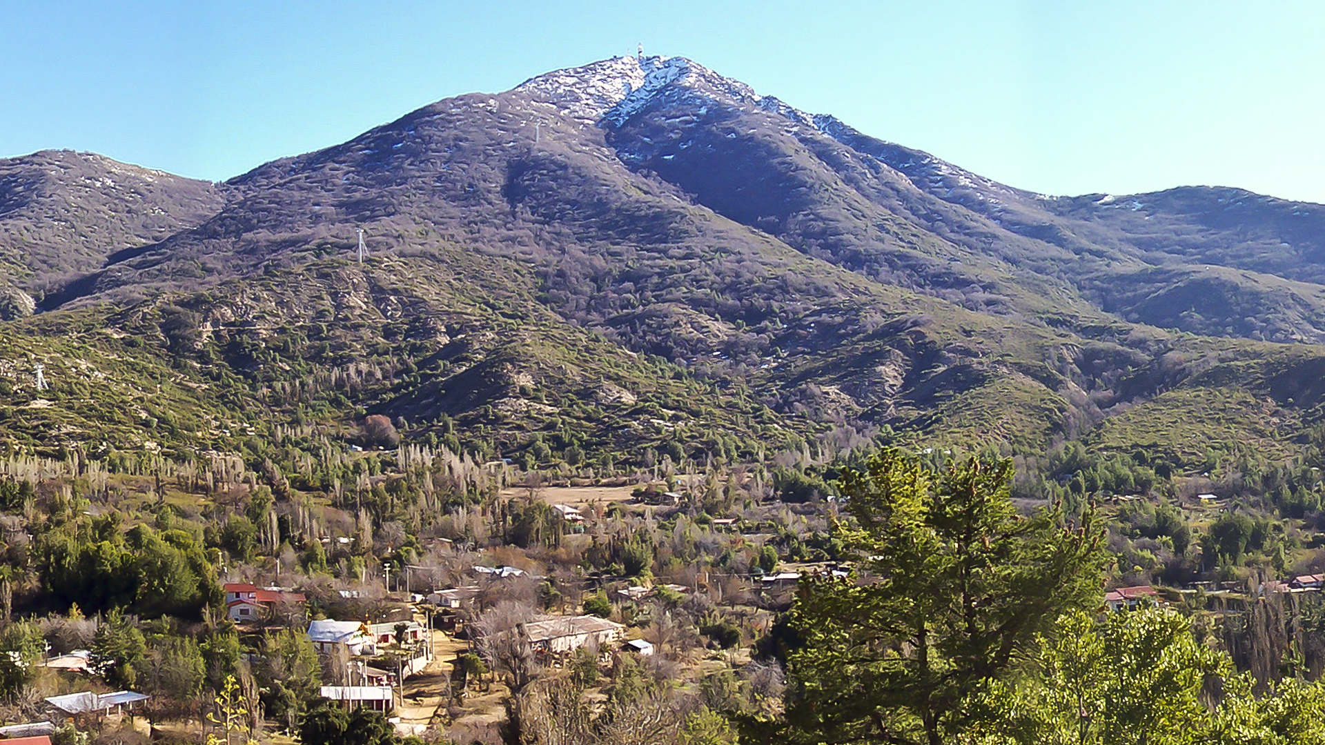 Cerro El Roble, sector La Capilla de Caleu. This is a photo of a national monument in Chile: 899